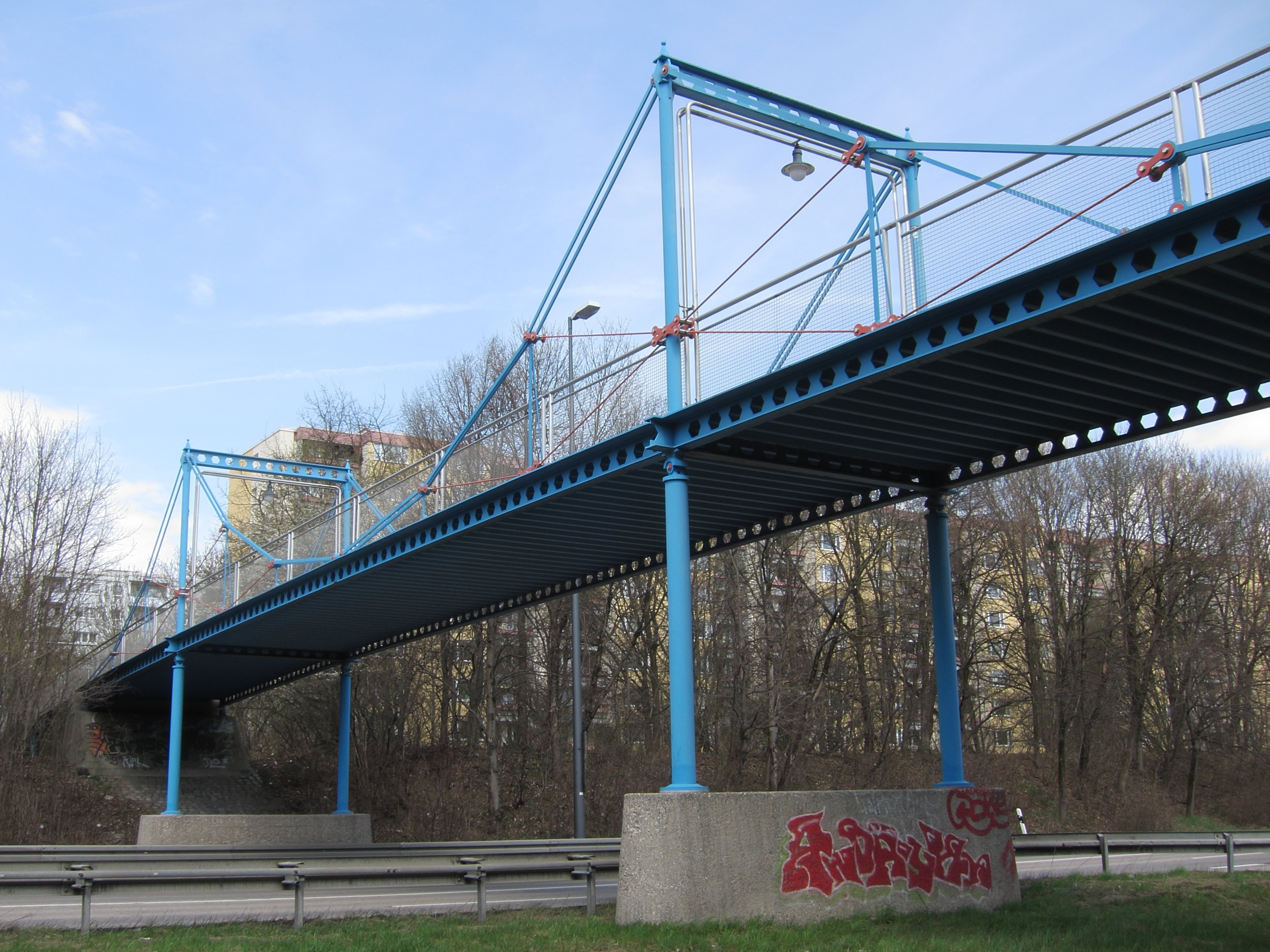 Kettenbrücke über die Ständlerstraße in Neuperlach